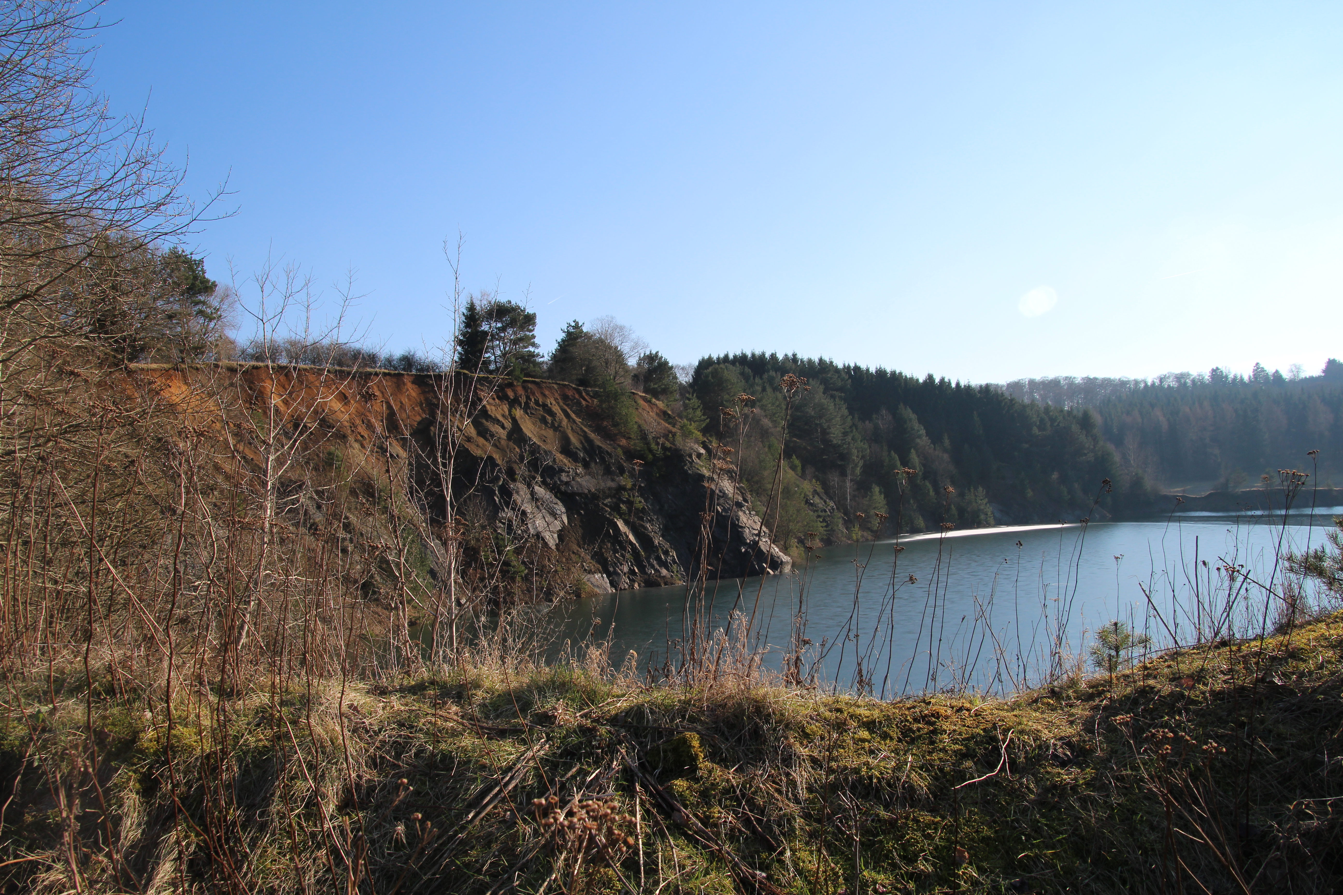 NSG